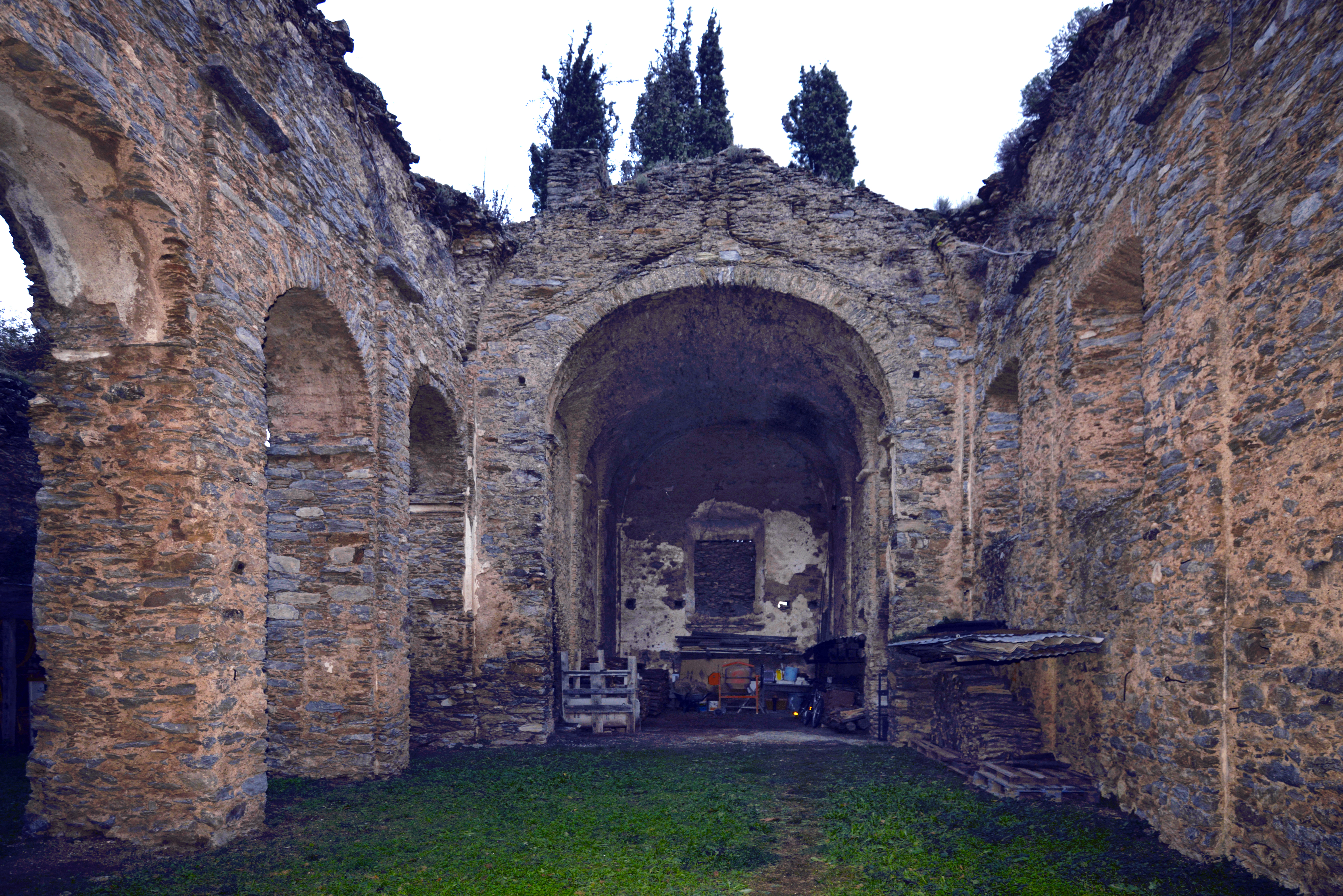 Linguizzetta, Costa Verde (Corse) - Ancien couvent de Verde